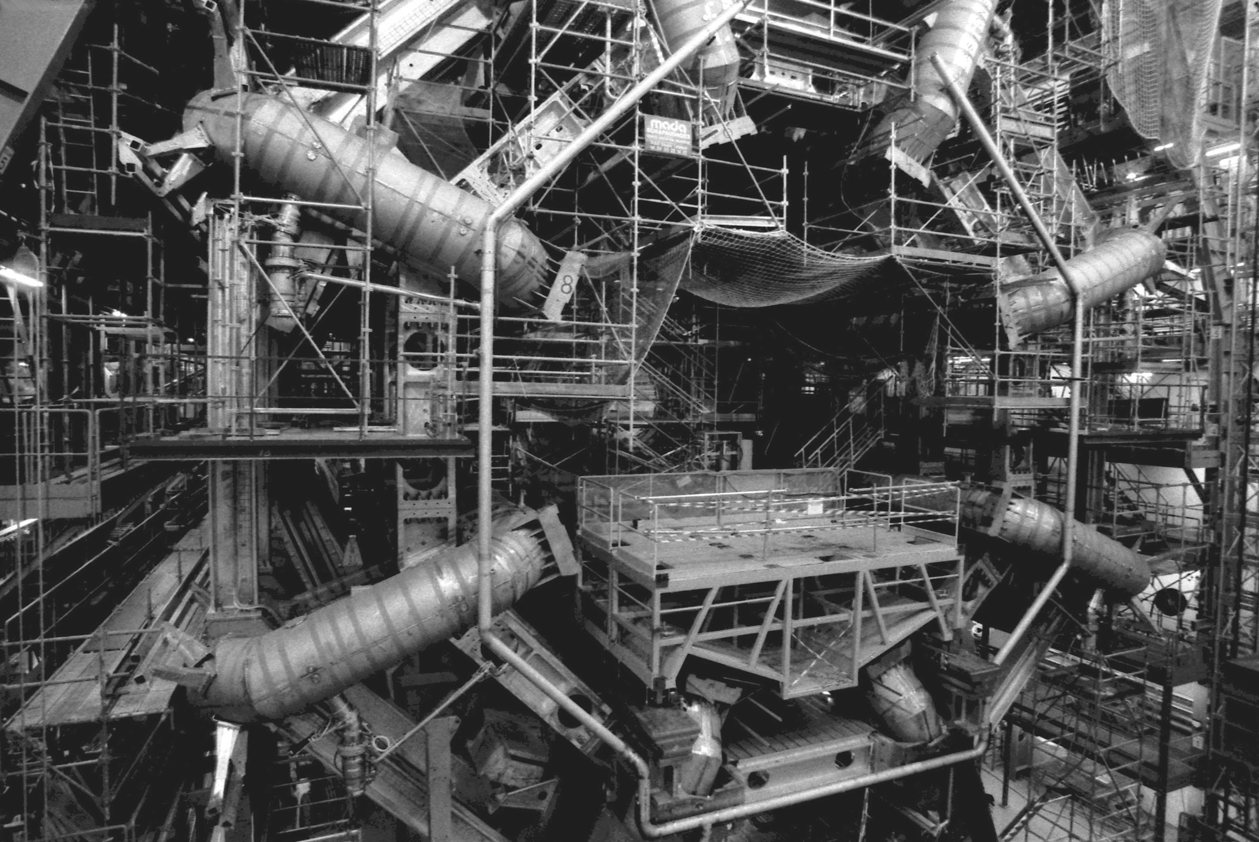 CERN: ATLAS et le Microcosme